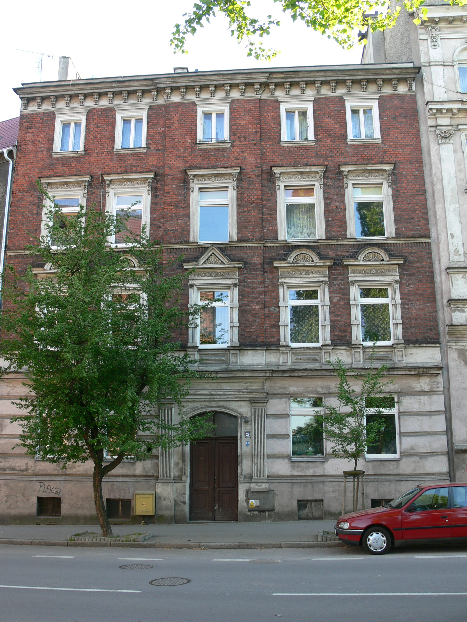 Racibórz - kamienica przy ul. Staszica 29